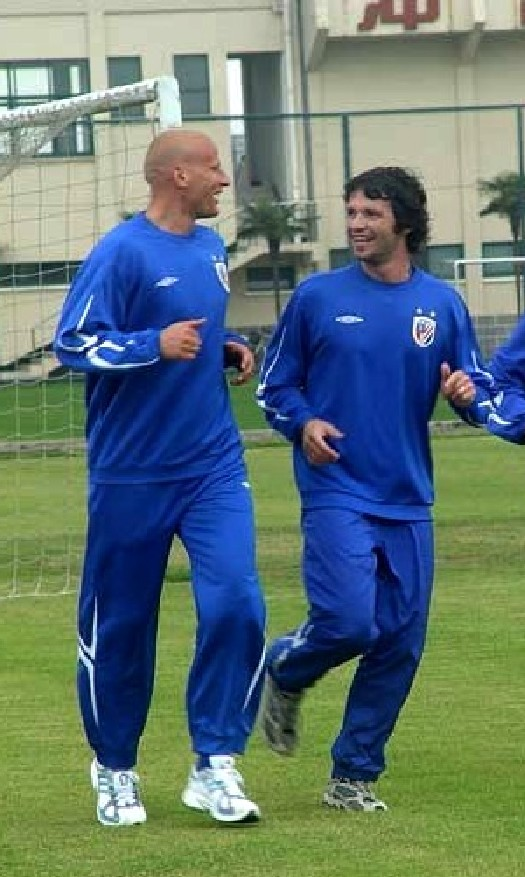 Carsten Jancker